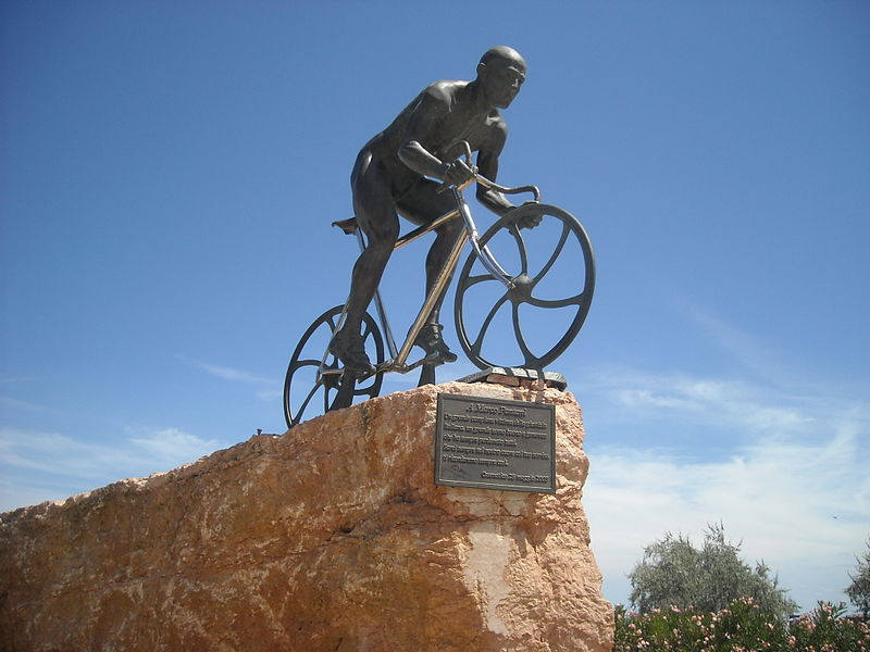 Marco Pantani Statua